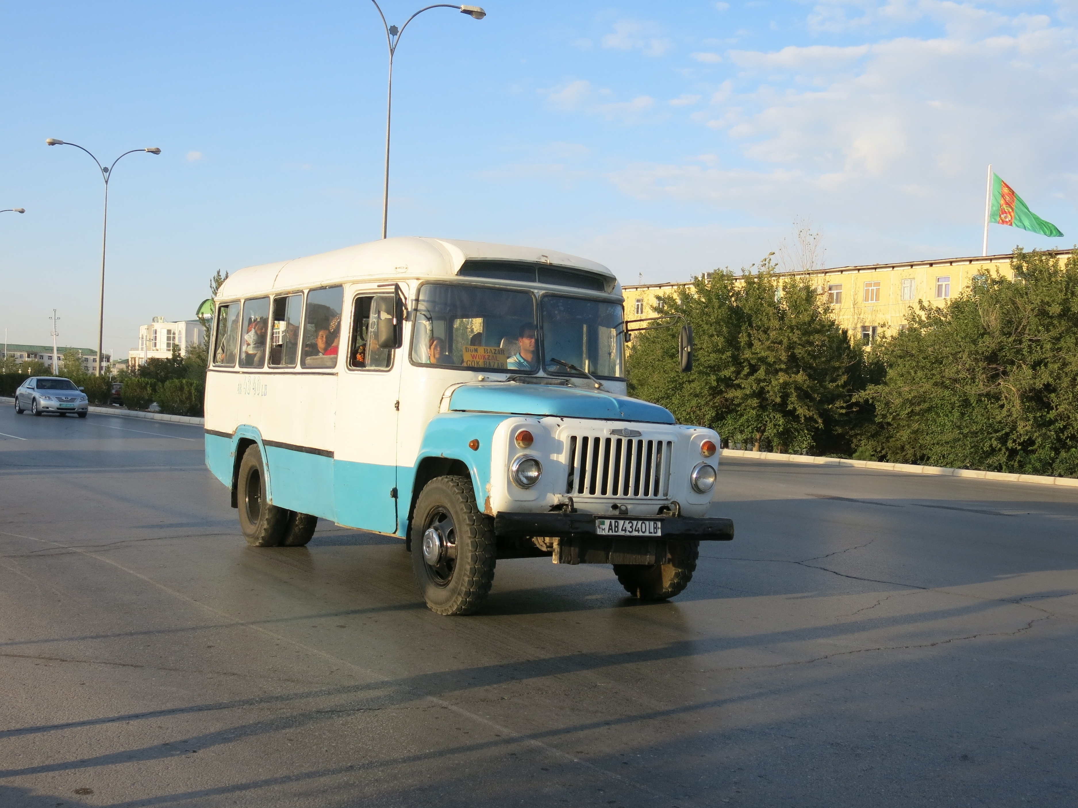 Stadtbus auf der Fahrt vom Hauptbahnhof in den westlichen Außenbezirk Turkmenabats